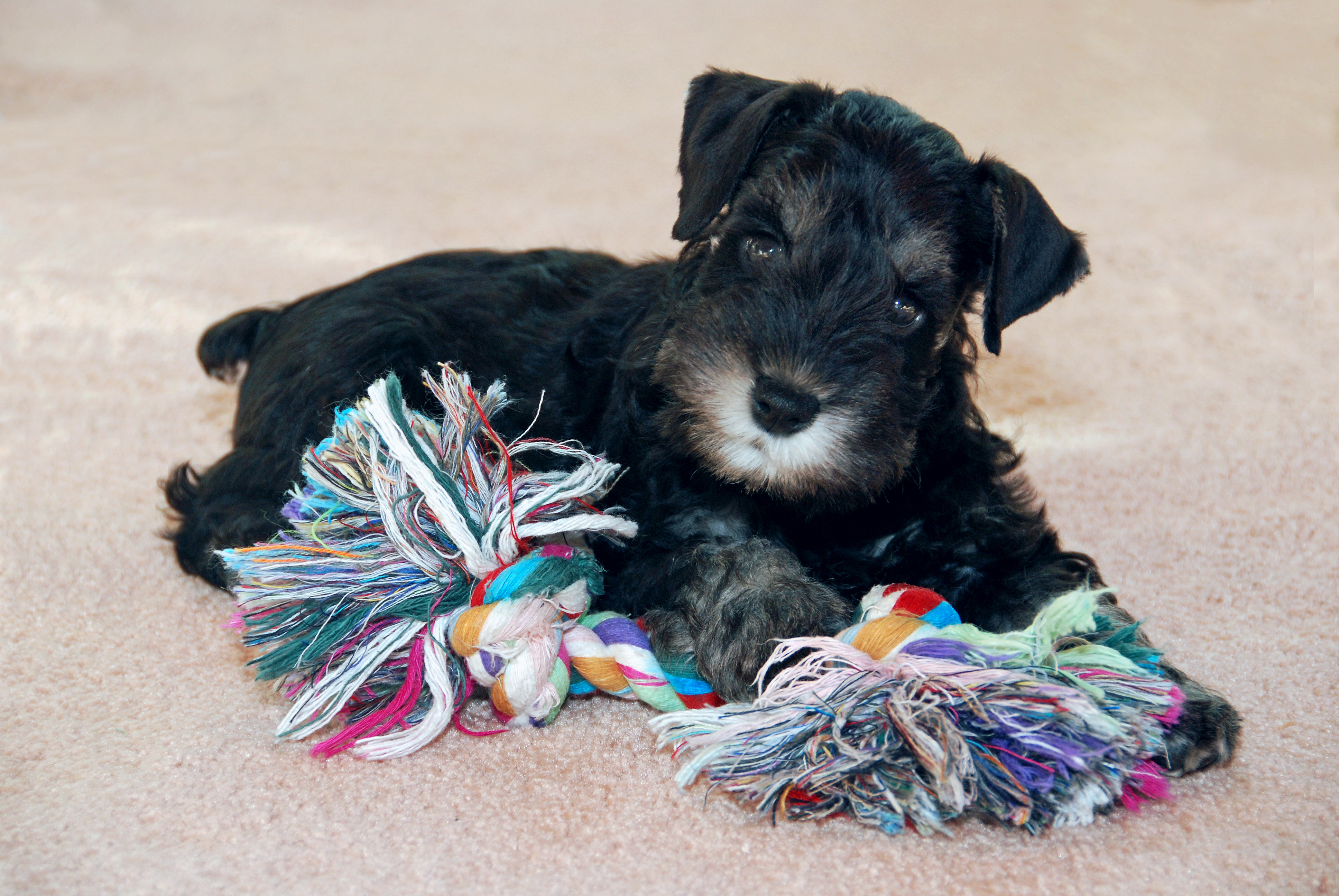 Miniature Schnauzer Pup